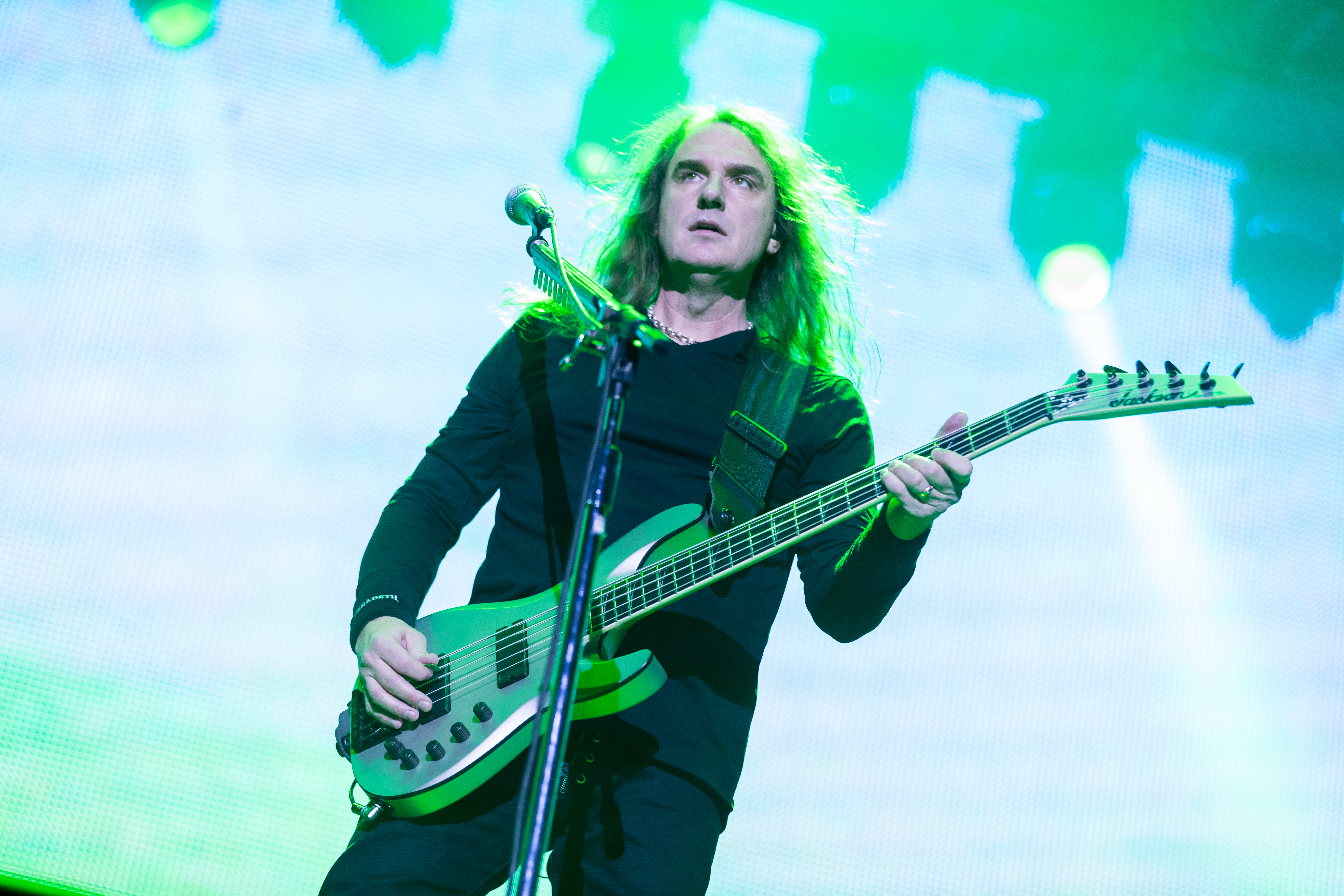 Megadeth during Wacken Open Air at Schleswig-Holstein, Wacken, , Germany on 2017-08-04, Photo: Sven Mandel